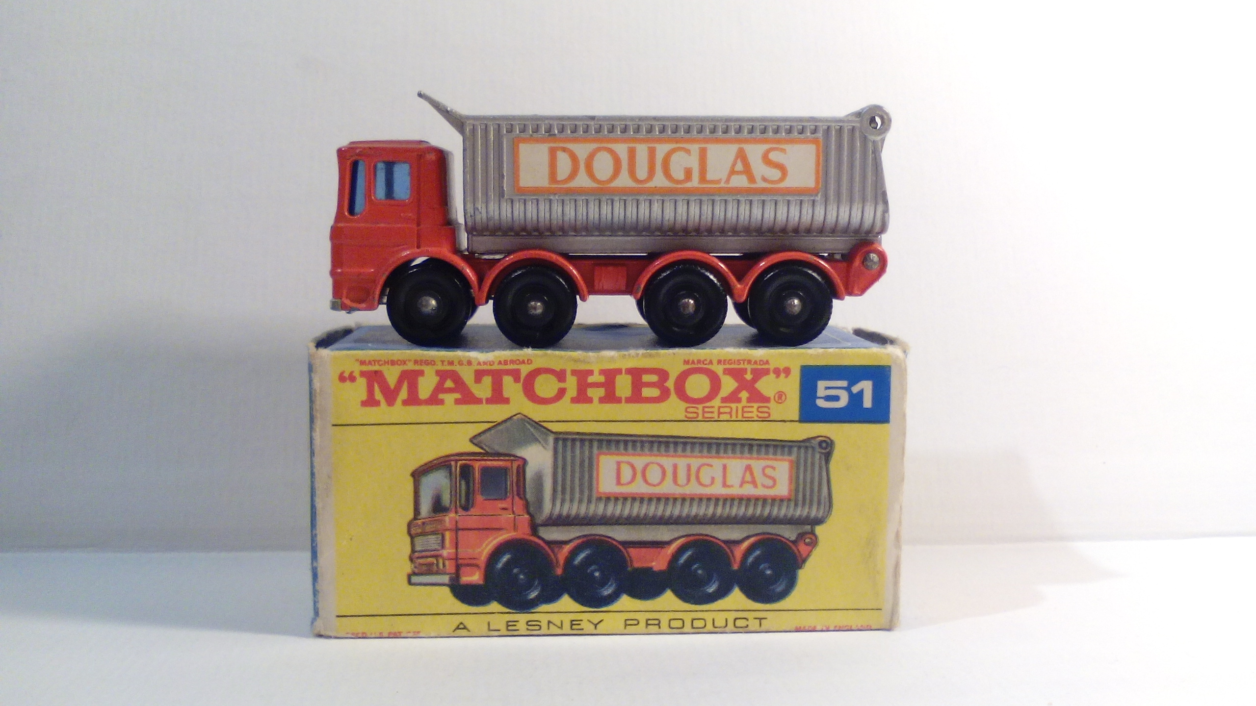 Matchbox Regular Wheels Tipper with original box from the 60's